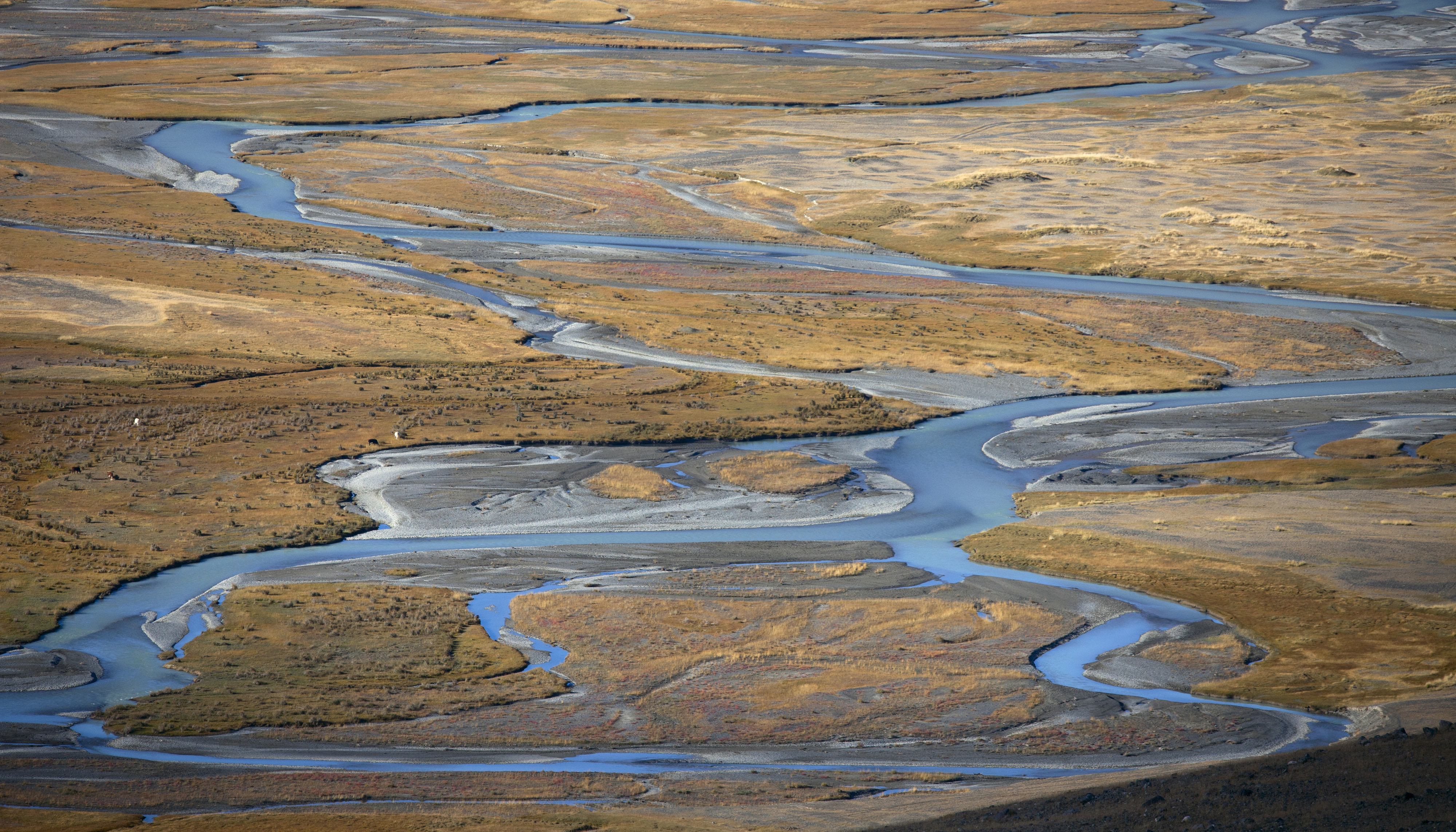 Юстыт, среднее течение